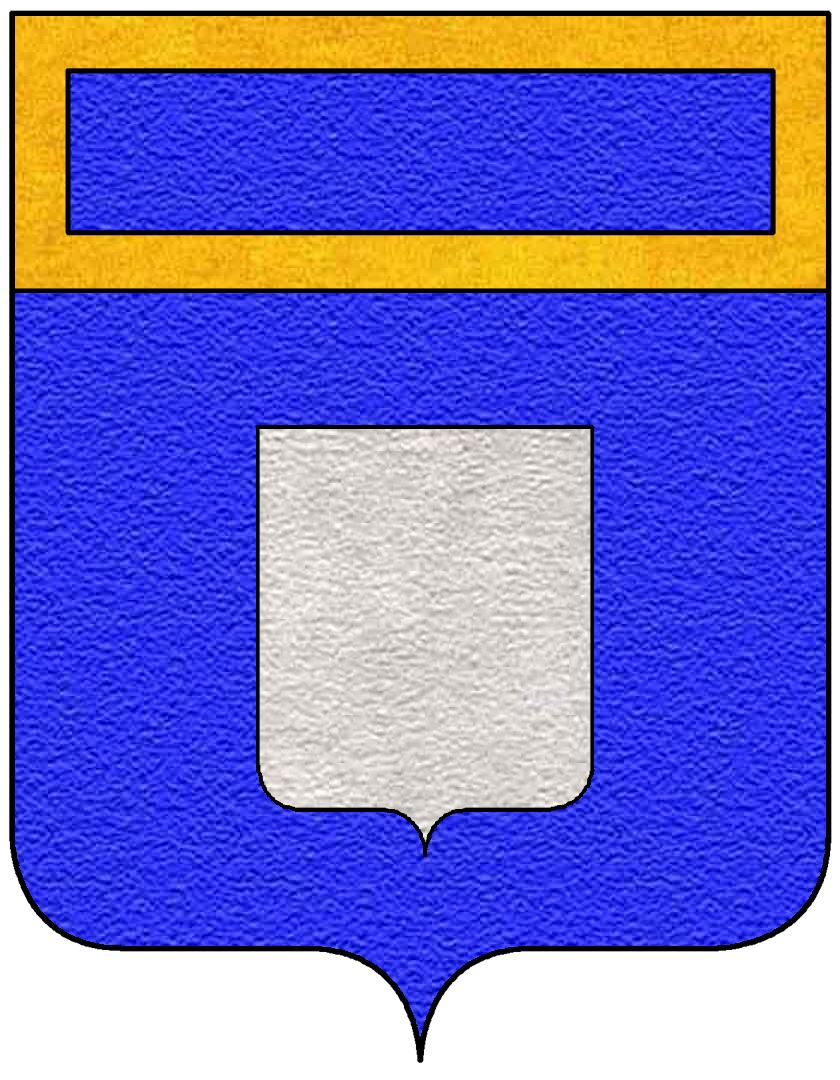 Stemma della famiglia Cocastelli